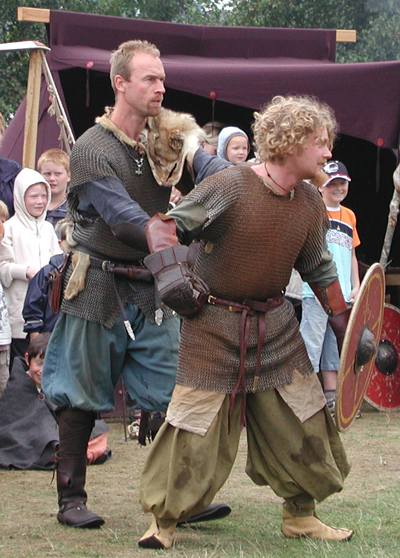 Vikingerollespillere der viser showkamp til vikingetrÃ¦f i Hobro. BersÃ¦rkeren forrest mÃ¥ holdes af sin kampfÃ¦lle for at han ikke i sin sanselÃ¸se galskab skal smadre publikum eller venner.